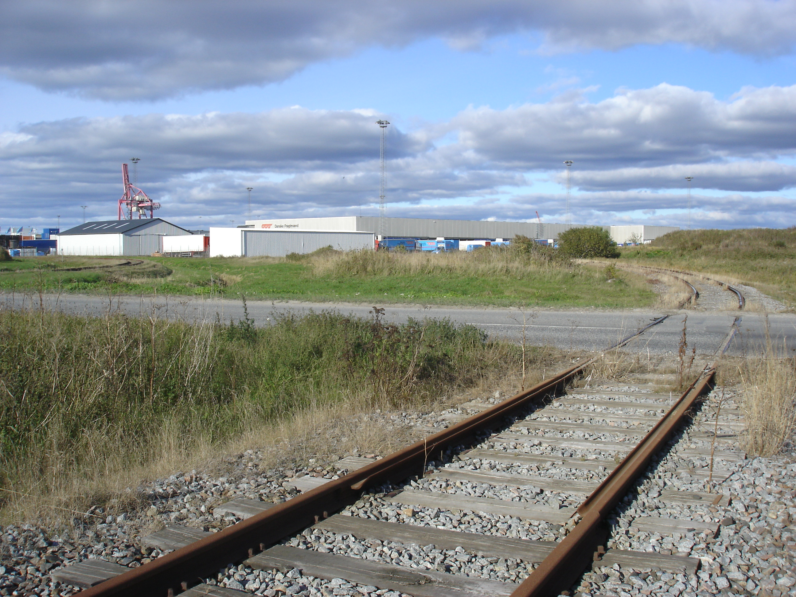 Aalborg Havnebanes sidespor til Fragtcentralen - hovedsporet ses tv.